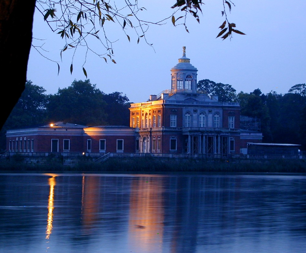 Marmorpalais (Original text: Das Marmorpalais im Neuen Garten, Potsdam) Fotograf/Zeichner: Olaf Oehlsen,Potsdam Datum der Aufnahme: 2004